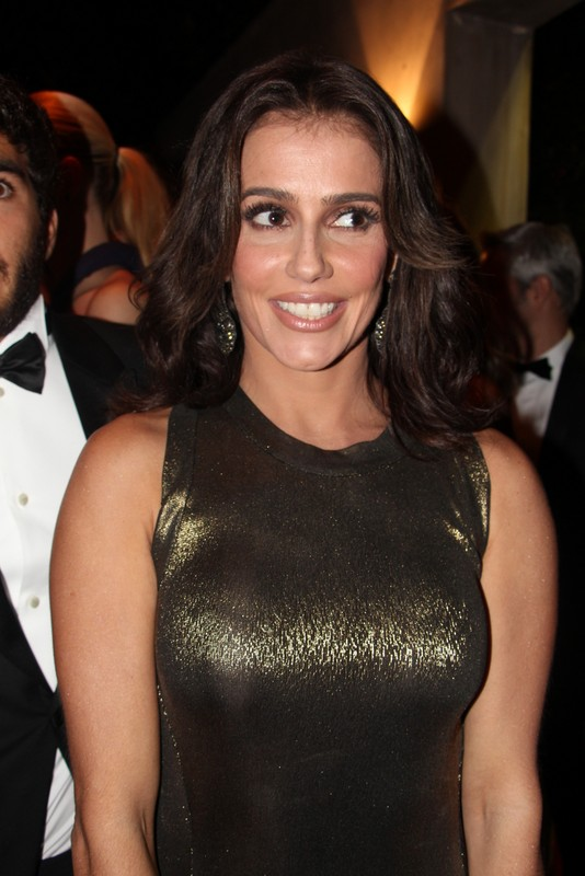 26 - Deborah Secco